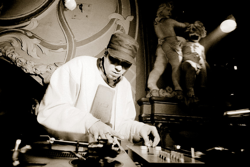 DJ Mirko Machine, live in full effect in HH